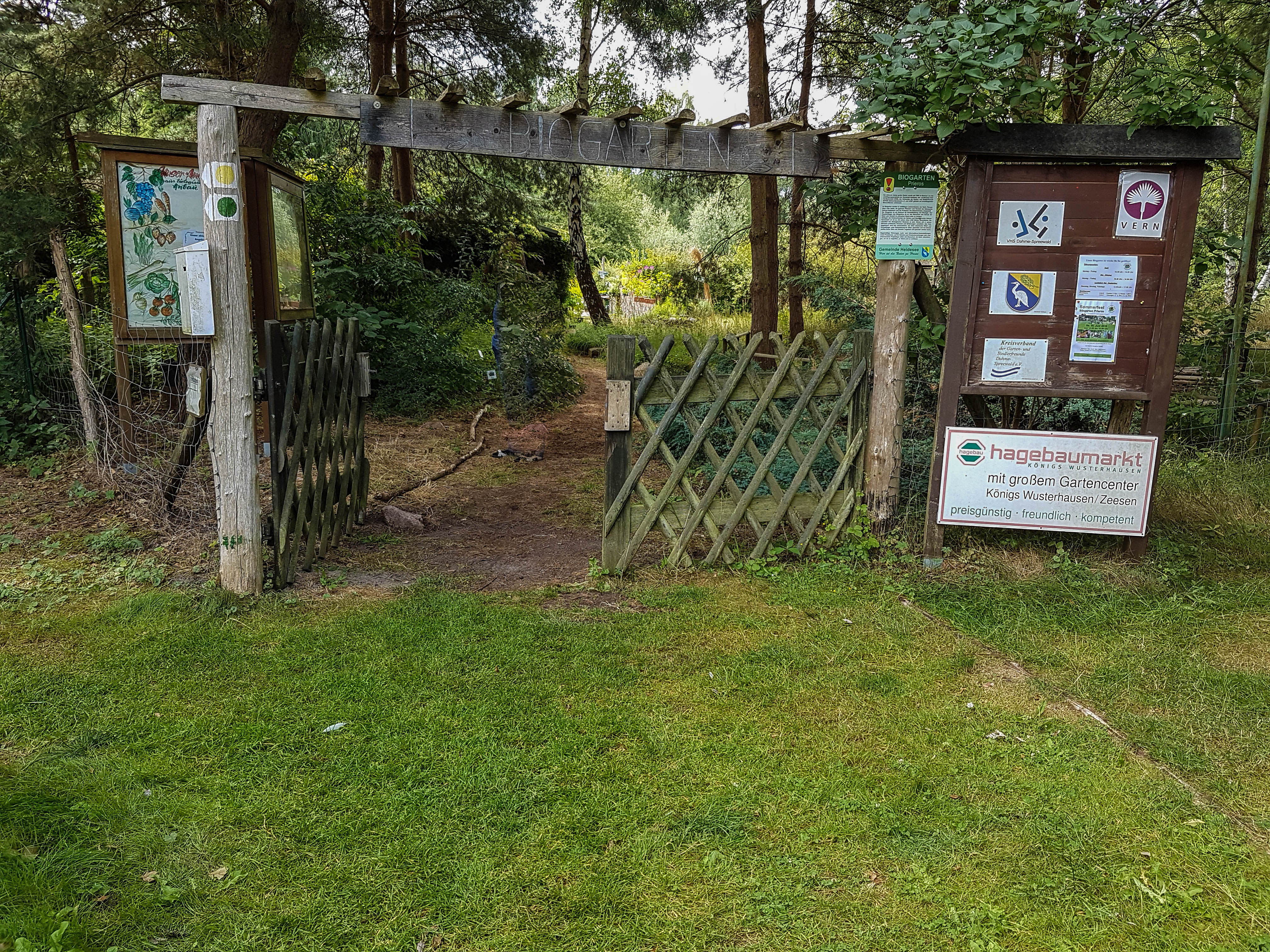 Biogarten Prieros, Eingang